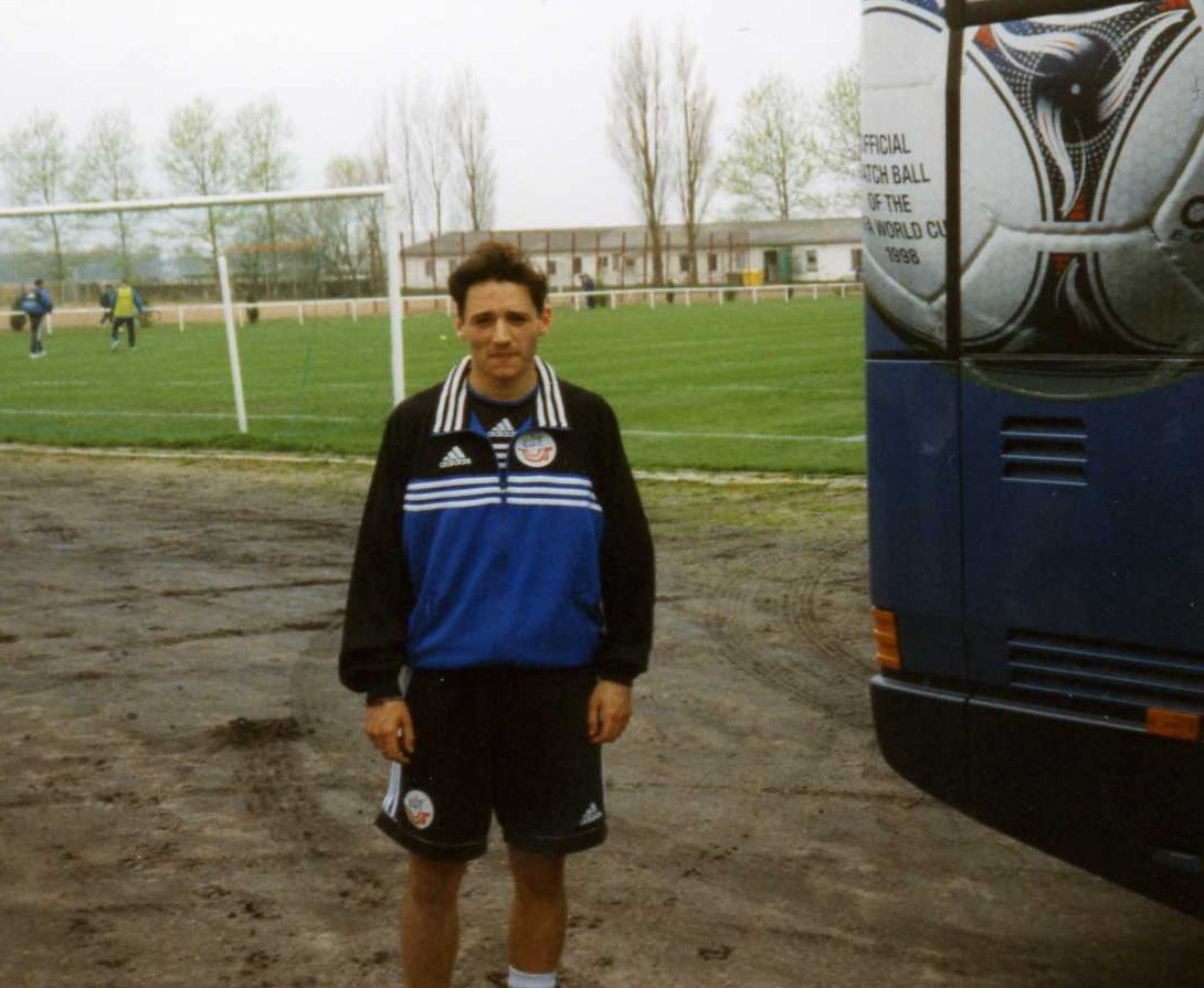 Oliver Neuville Frühjahr 1999 bei Hansa Rostock, Training